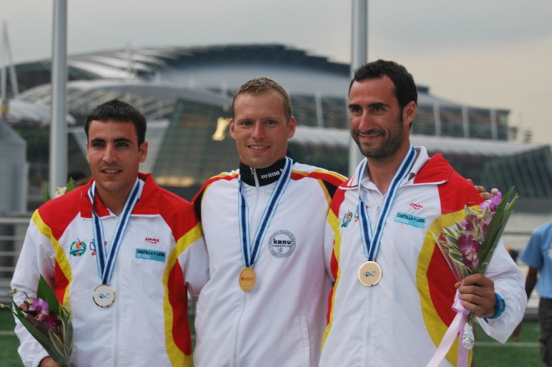 Siegerehrung bei der WM in Singapur 2011